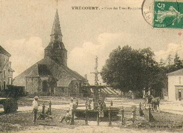 Vrécourt (Vosges - France) : place des Trois Bourdons